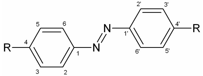 structure azobenzene d'indicateurs colorés